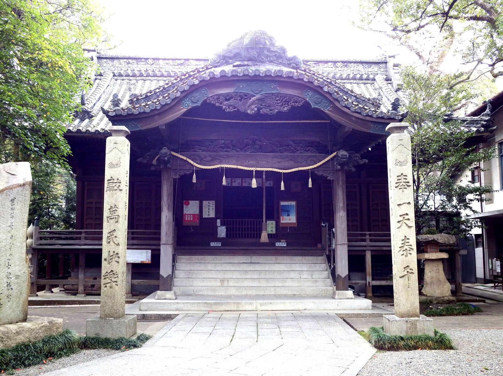 三島神社拝殿